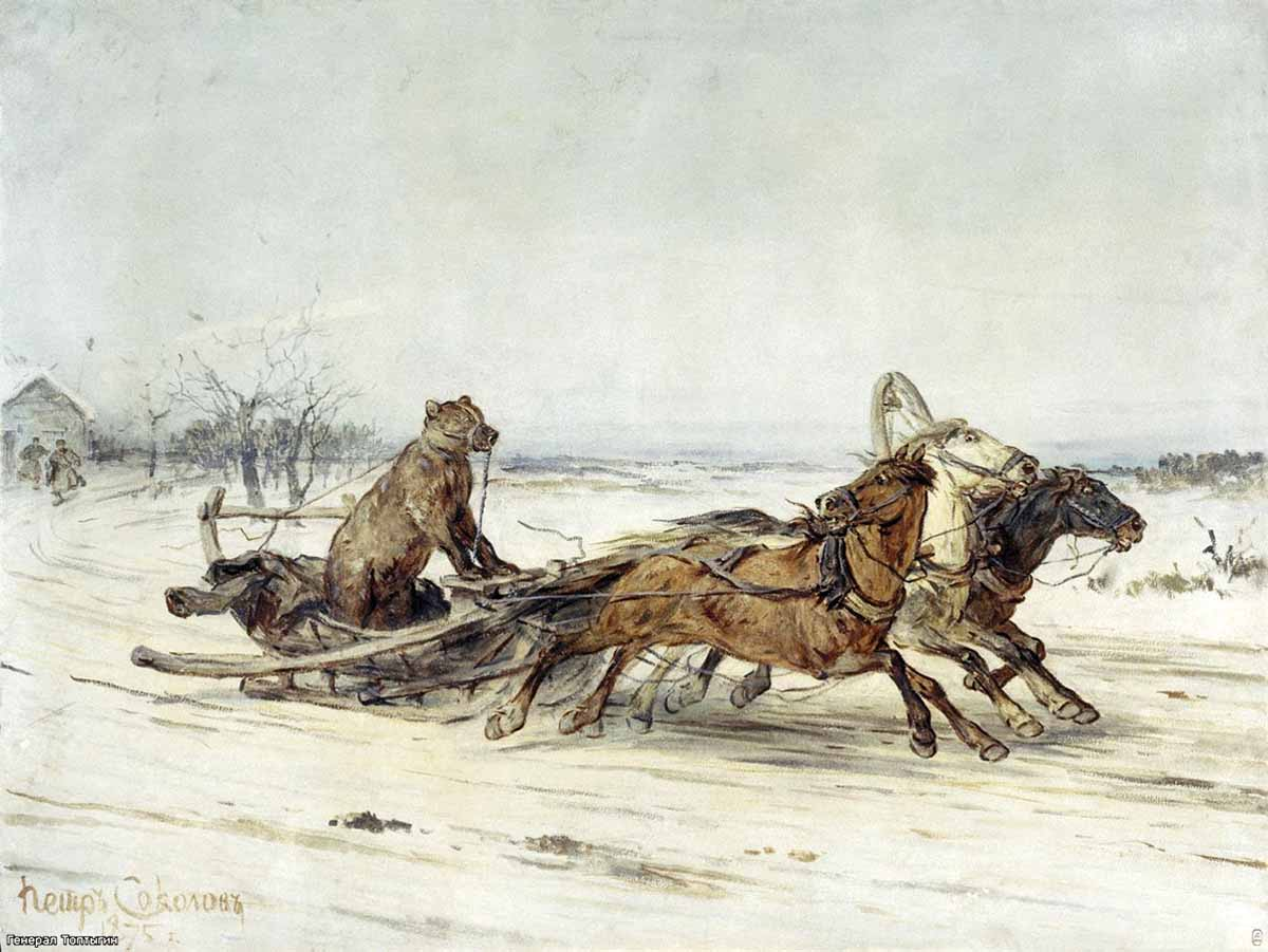 «Генерал Топтыгин» 1875 Холст, масло Государственный Русский музей